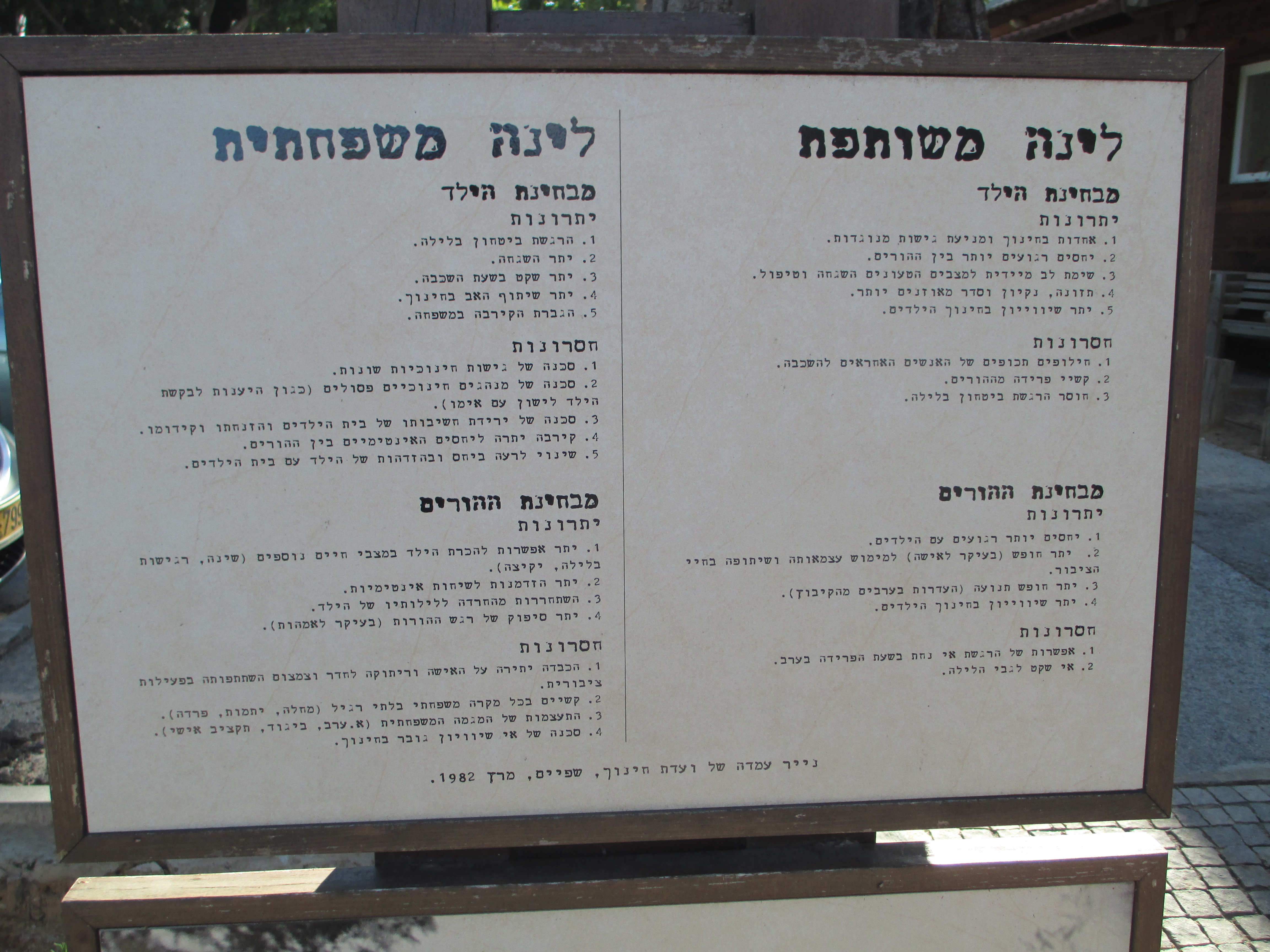 נמוקים בעד ונגד לינה משותפת ולינה משפחתית - בתערוכה פתוחה על תולדות שפיים במרכז הקיבוץ